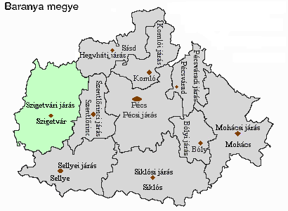 Magyarország, Baranya megye, Szigetvári járás